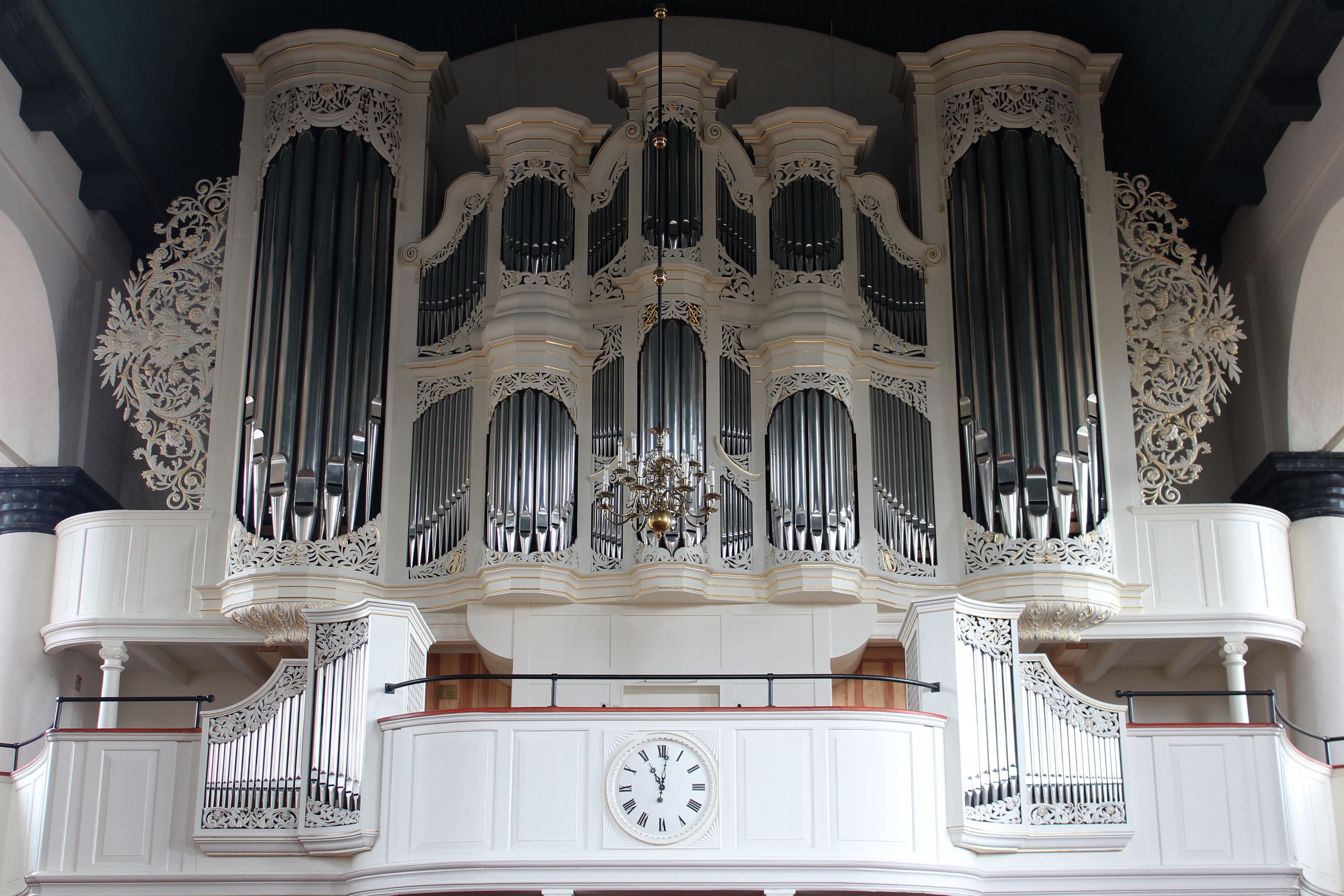 Prospekt der Orgel der Großen Kirche zu Leer, Ostfriesland